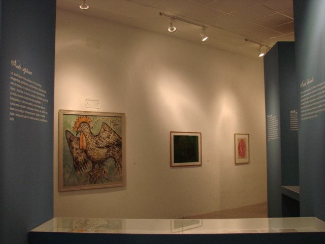 Museo de Arte Contemporáneo Mario Abreu, Avenida Constitución,. Maracay, Estado Aragua, Venezuela.